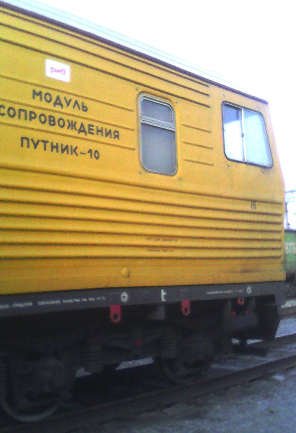 Рельсовозный состав РС-800/3 на железнодорожной станции Металлургическая ЮУЖД с 30 рельсовыми плетями по 800 м длиной сваренных на РСП-13 г. Челябинск. Модуль сопровождения "Путник-10" (62-й вагон состава).